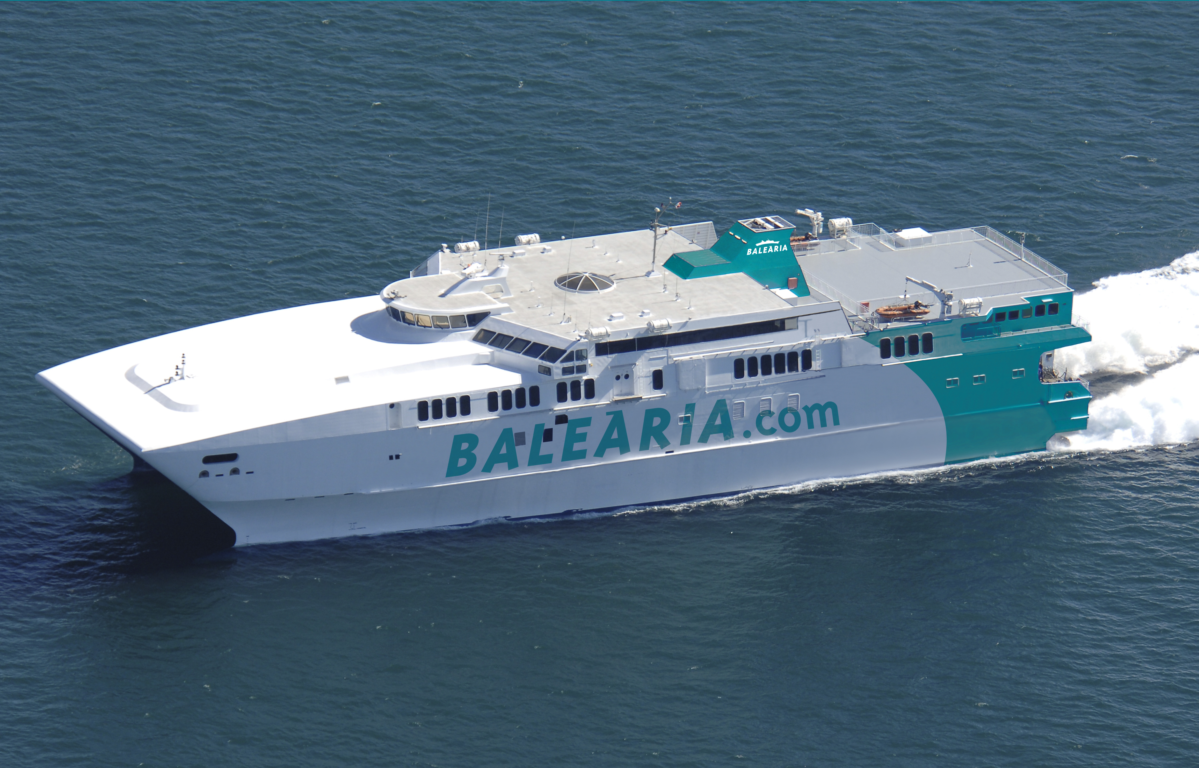 El fast ferri 'Avemar Dos' opera entre Ceuta y Algeciras